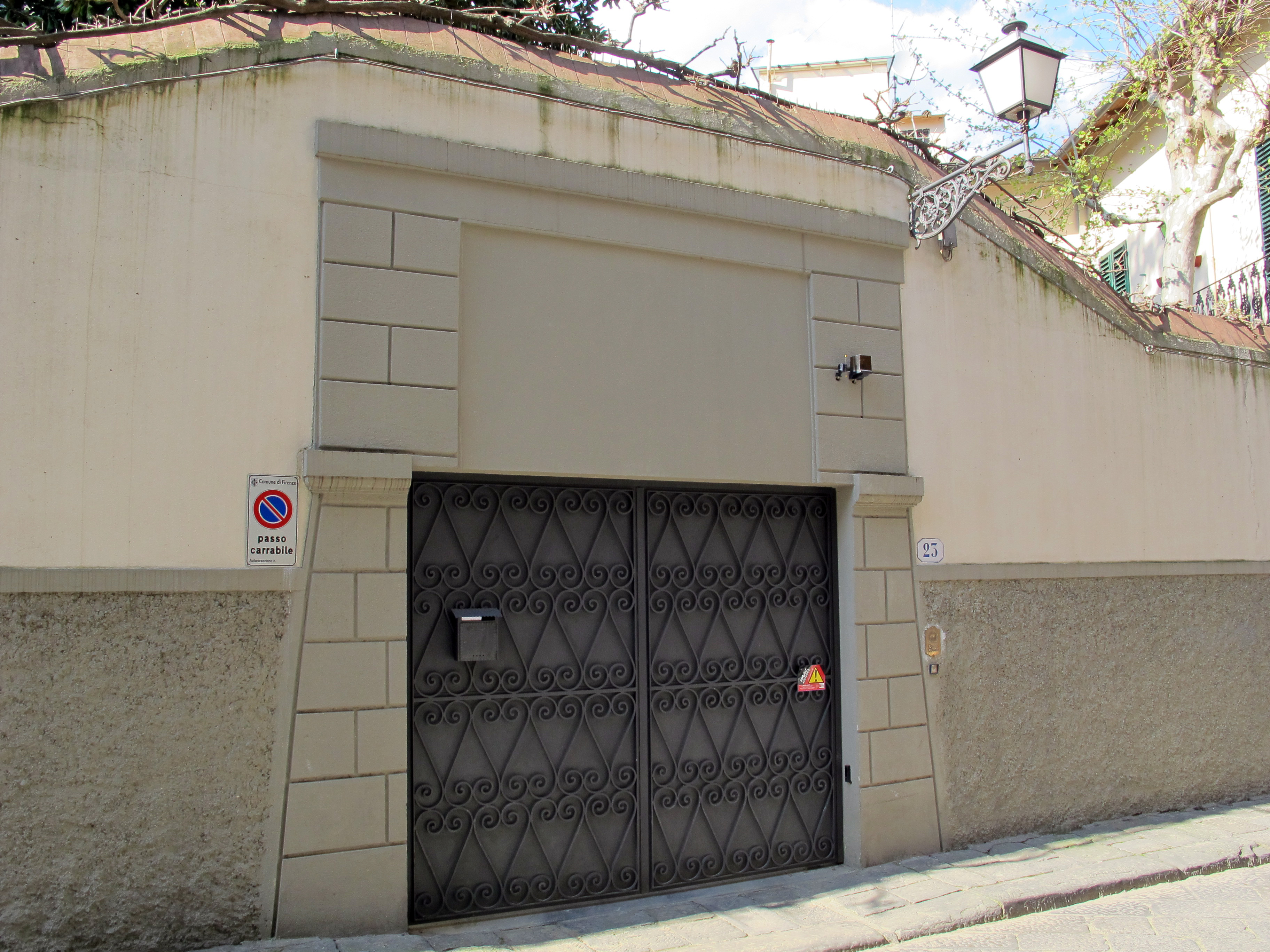 Via delle casine 31r, ex- teatro brendel